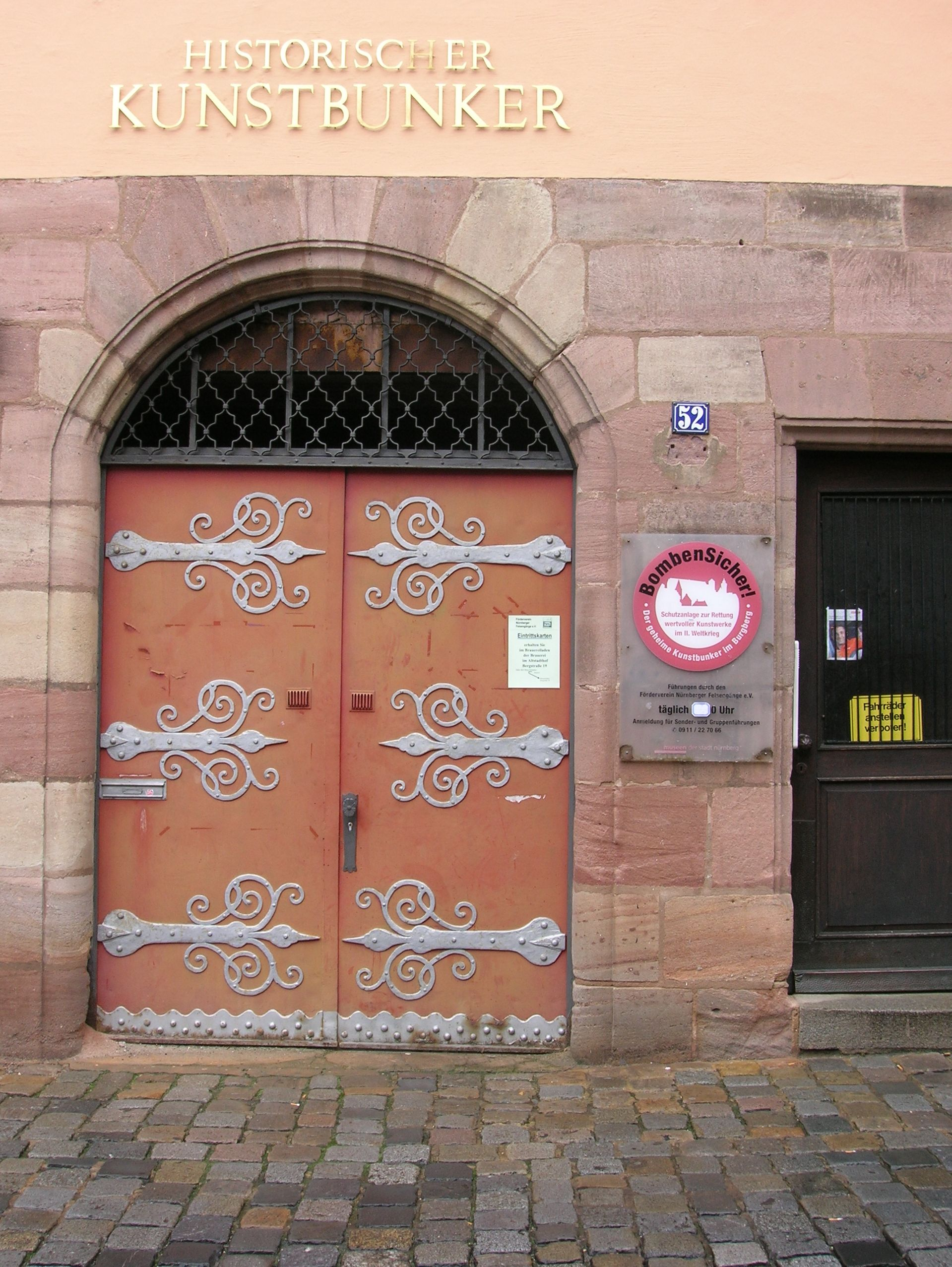 Historischer Kunstbunker Nuremberg, Germany (Entrance)